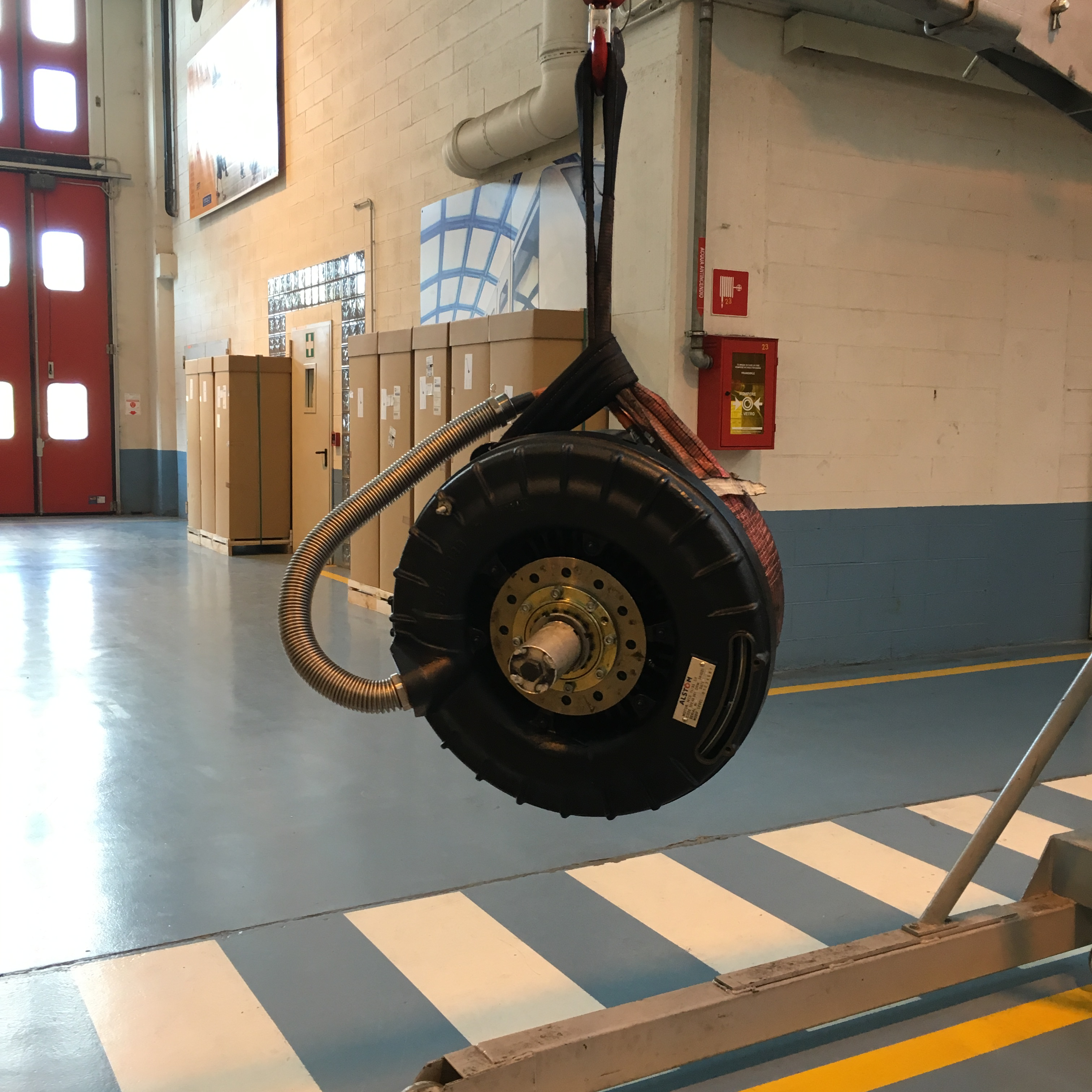 Il motore di un treno VAL